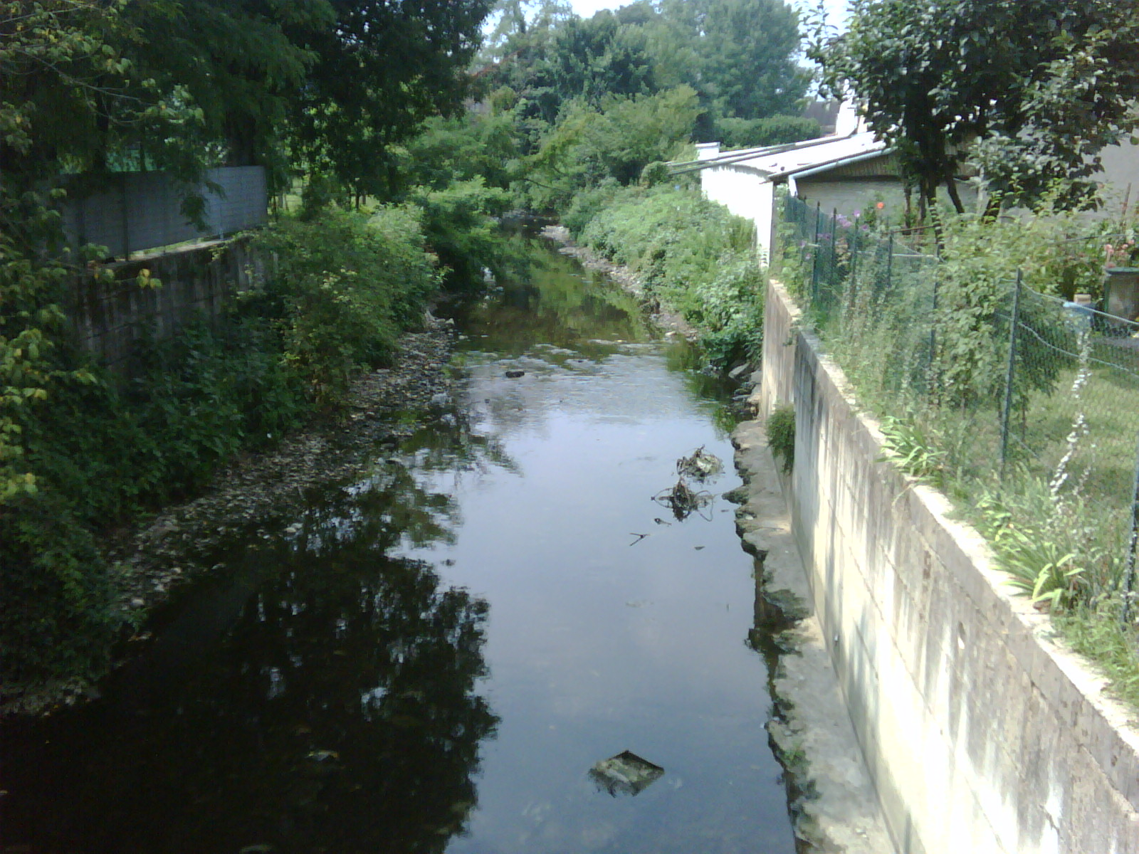 Il fiume Seveso a Paderno Dugnano (MI)